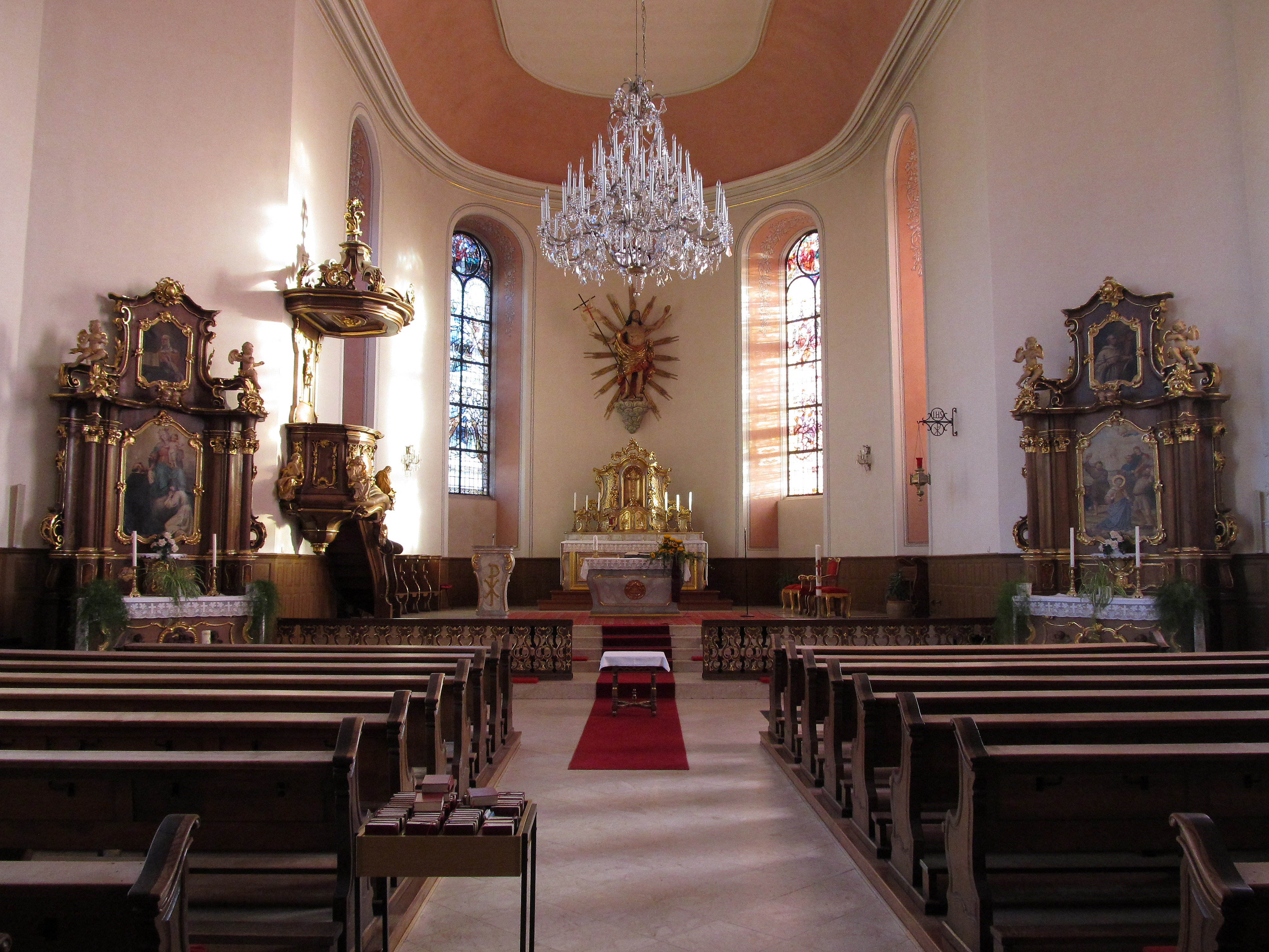 Blick ins Innere der katholischen Pfarrkirche St. Stephan in Illingen, Saarland